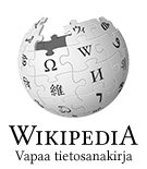 Wikipedia logo 2.0 (fi)